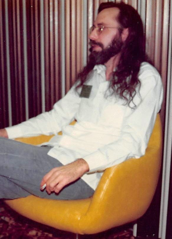 Joseph o´Sullivan alias Spider Webb auf der Tattoo Convention Houston 1978.